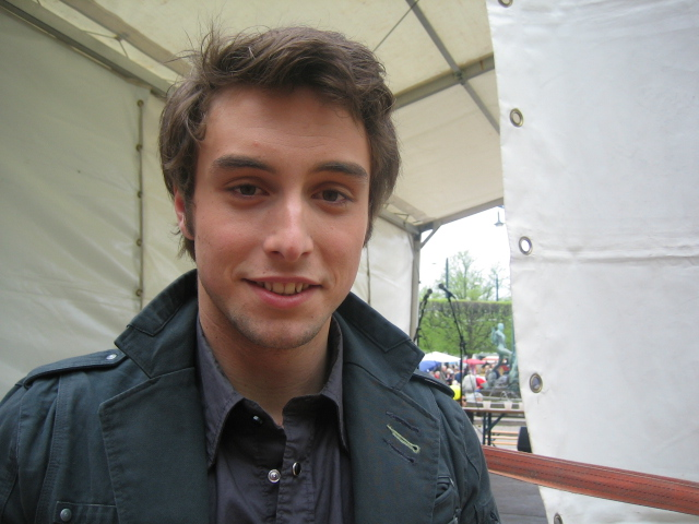 Fotograf: Frida Hansson Datum: 2006-05-13